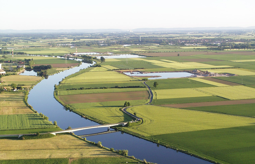 Luftbild der Mittelweser mit Kiesabbauteichen in Landesbergen; im Hintergrund 380-kV-Freileitungskreuzungen der Weser (die hohen rot-weißen Masten gehören zur Ltg. 3017 Landesbergen–Wehrendorf)